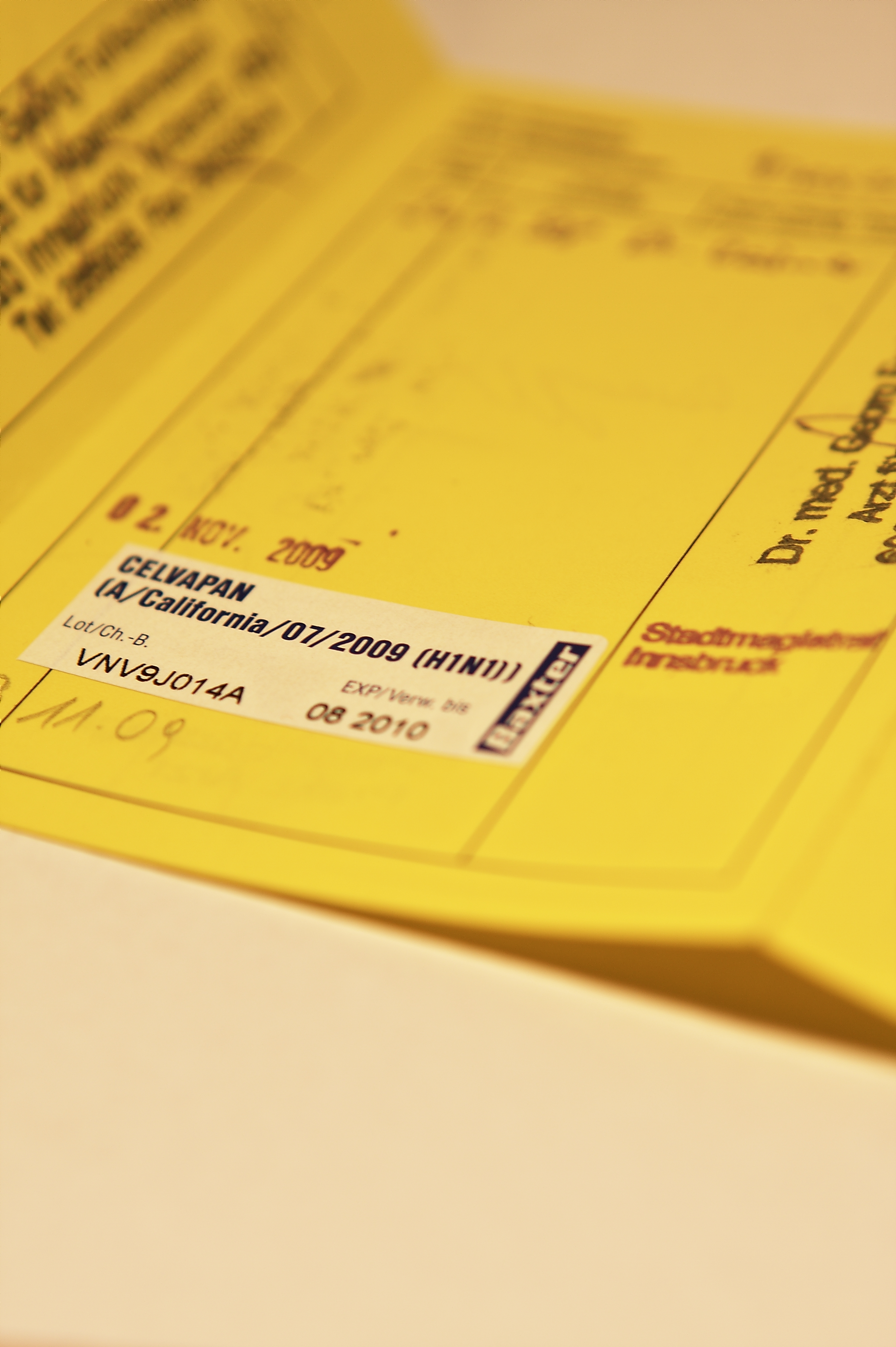 Yellow Card with an entry from a H1N1-vaccination "Celvapam" by Baxter